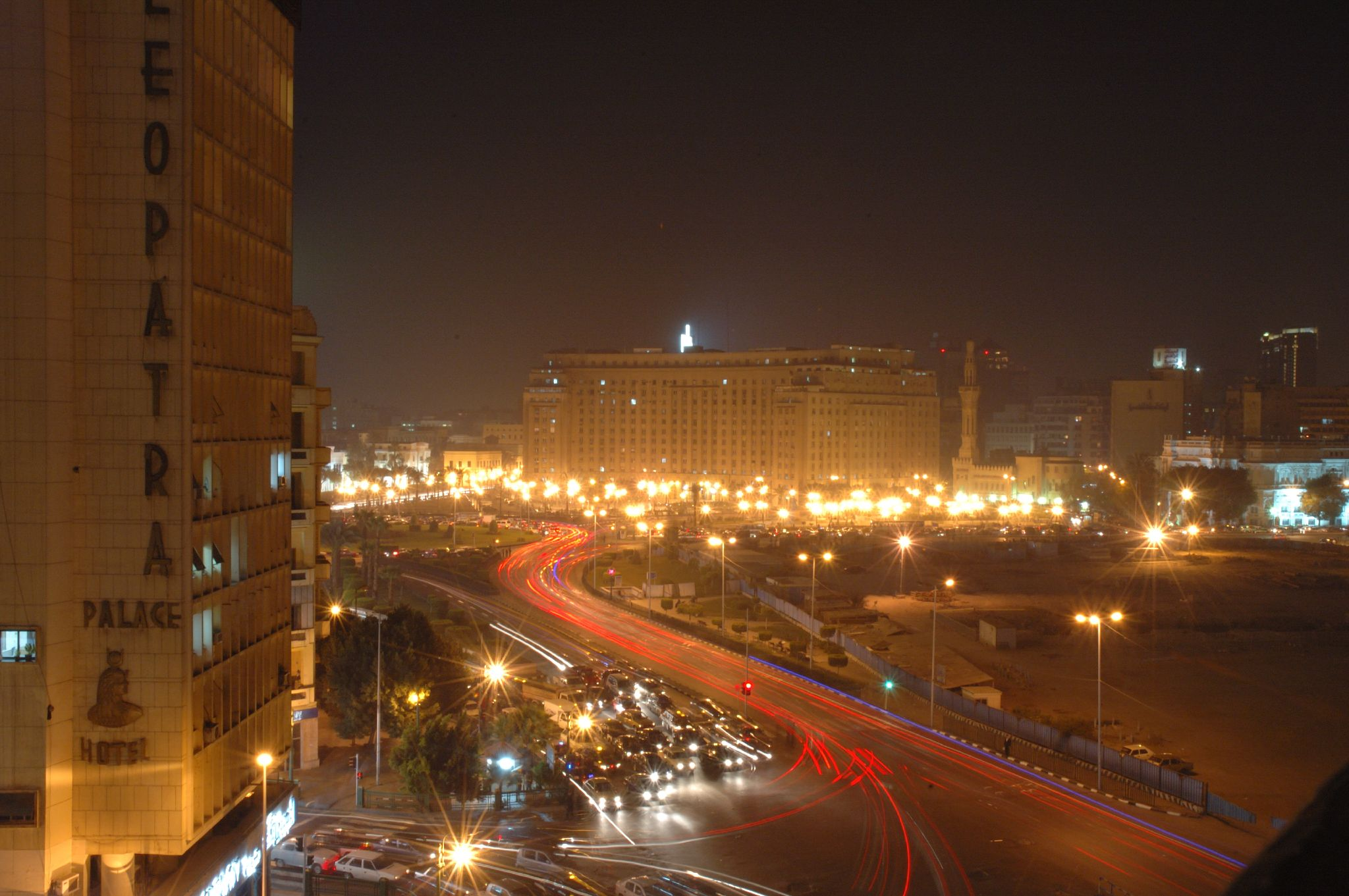 Cairo: traffico notturno